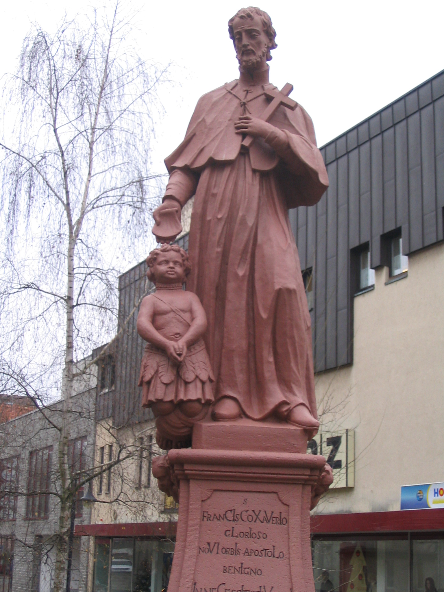 Franz Xaver (eigentlich Francisco de Xavier y Jassu) mit knieendem Inderjungen auf der Mittelbrücke (Ostseite) in Bensheim, 1747 erbaut, Nachbildung aus dem frühen 20. Jahrhundert. Die Jahreszahl ergibt sich aus den groß geschriebenen Buchstaben der vollständigen Inschrift (sieh: Image:Mittelbrücke Inschrift östlich.jpg), wenn man sie als römische Zahlen versteht.